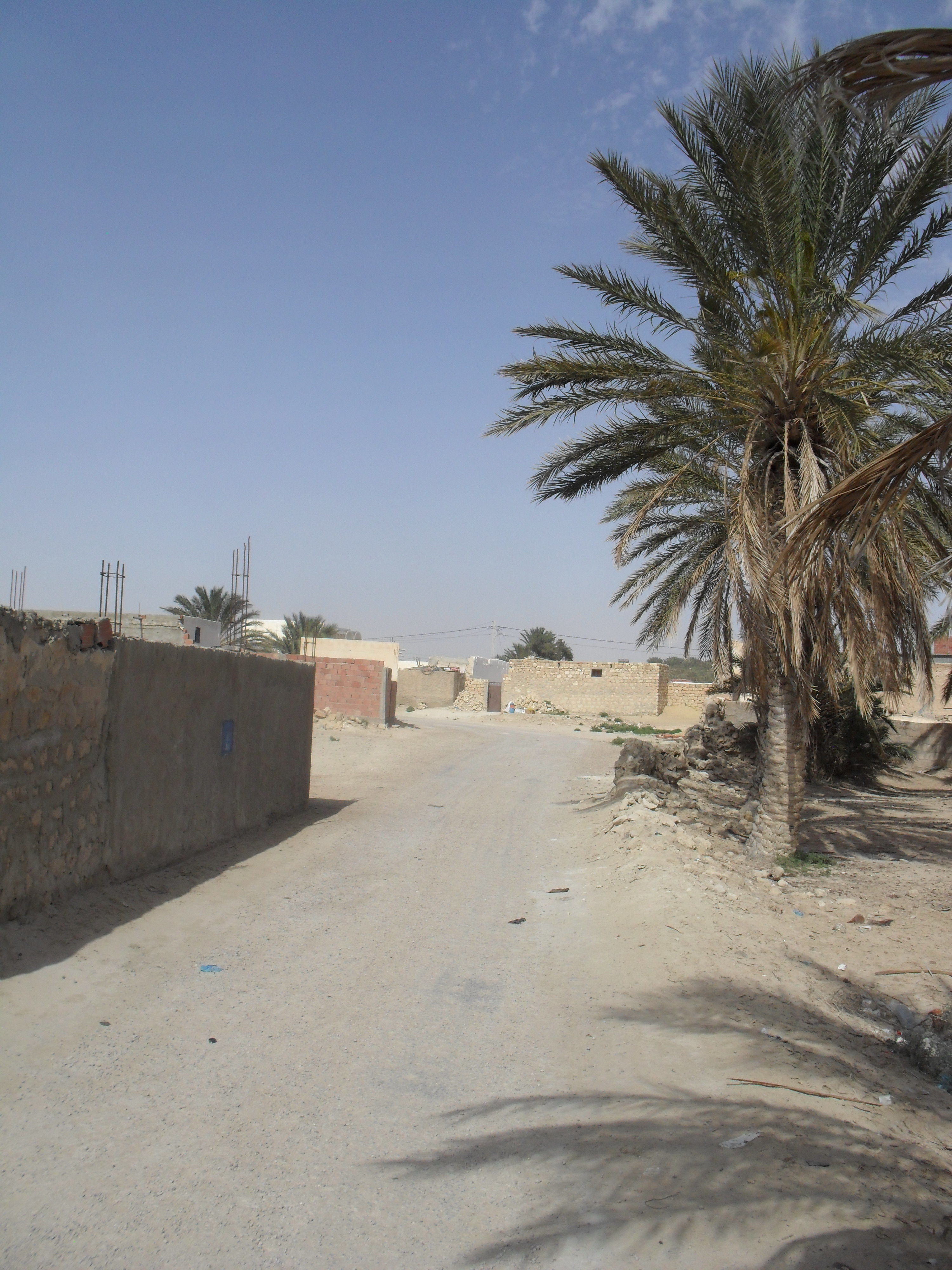 с. Неґґа